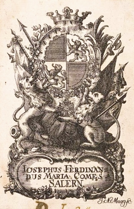 Ex Libris, Kupferstich, Joseph Ferdinand Maria Graf von Salern (1718-1805), unehelicher Abkomme aus dem Haus Wittelsbach